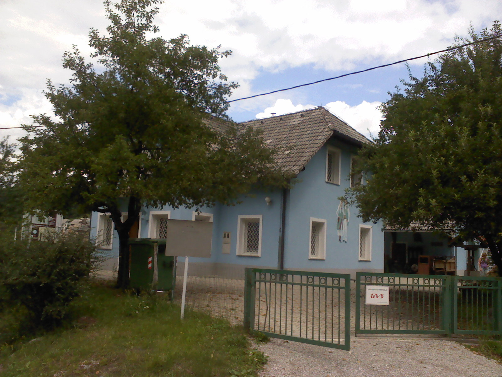 Center Društva Kočevarjev staroselcev v Občicah